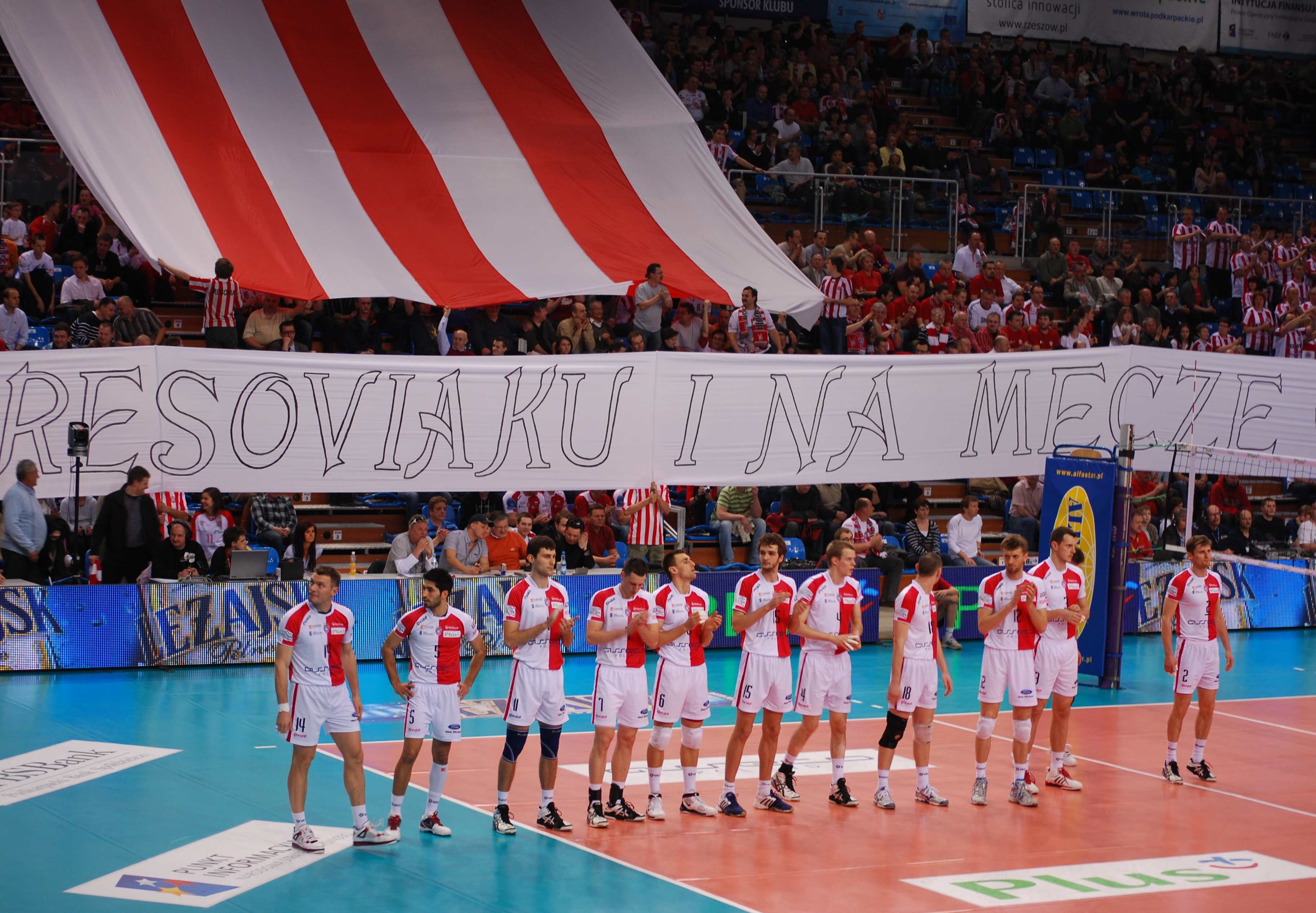 Asseco Resovia Rzeszów przed meczem z AZS Częstochową w Hali Podpromie w Rzeszowie (1 runda play-off). Od lewej stoją: 14. Paweł Papke 5. Rafael Redwitz 11. Grzegorz Kosok 7. Aleh Akhrem 6. Marcin Wika 15. Mateusz Mika 4. Mikko Oivanen 18. Ivan Ilić 12. Łukasz Perłowski 3. Wojciech Grzyb 16. Krzysztof Ignaczak 2. Krzysztof Gierczyński